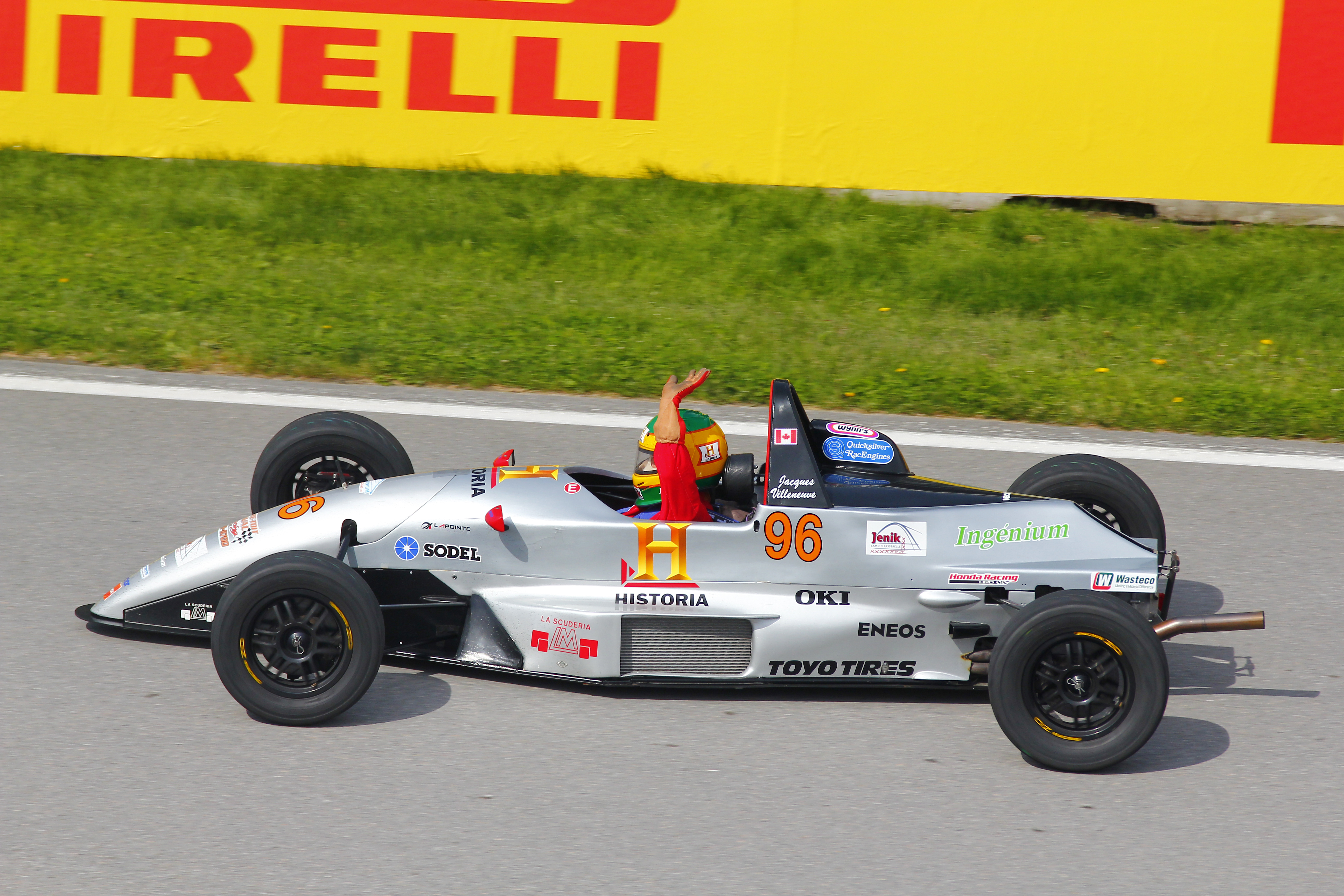 Jacques Villeneuve Sr. - Formule 1600 - Circuit Gilles-Villeneuve - Montréal - Grand Prix du Canada - 7 juin 2015 (Photo Paul-Émile Poulin-Jacques)